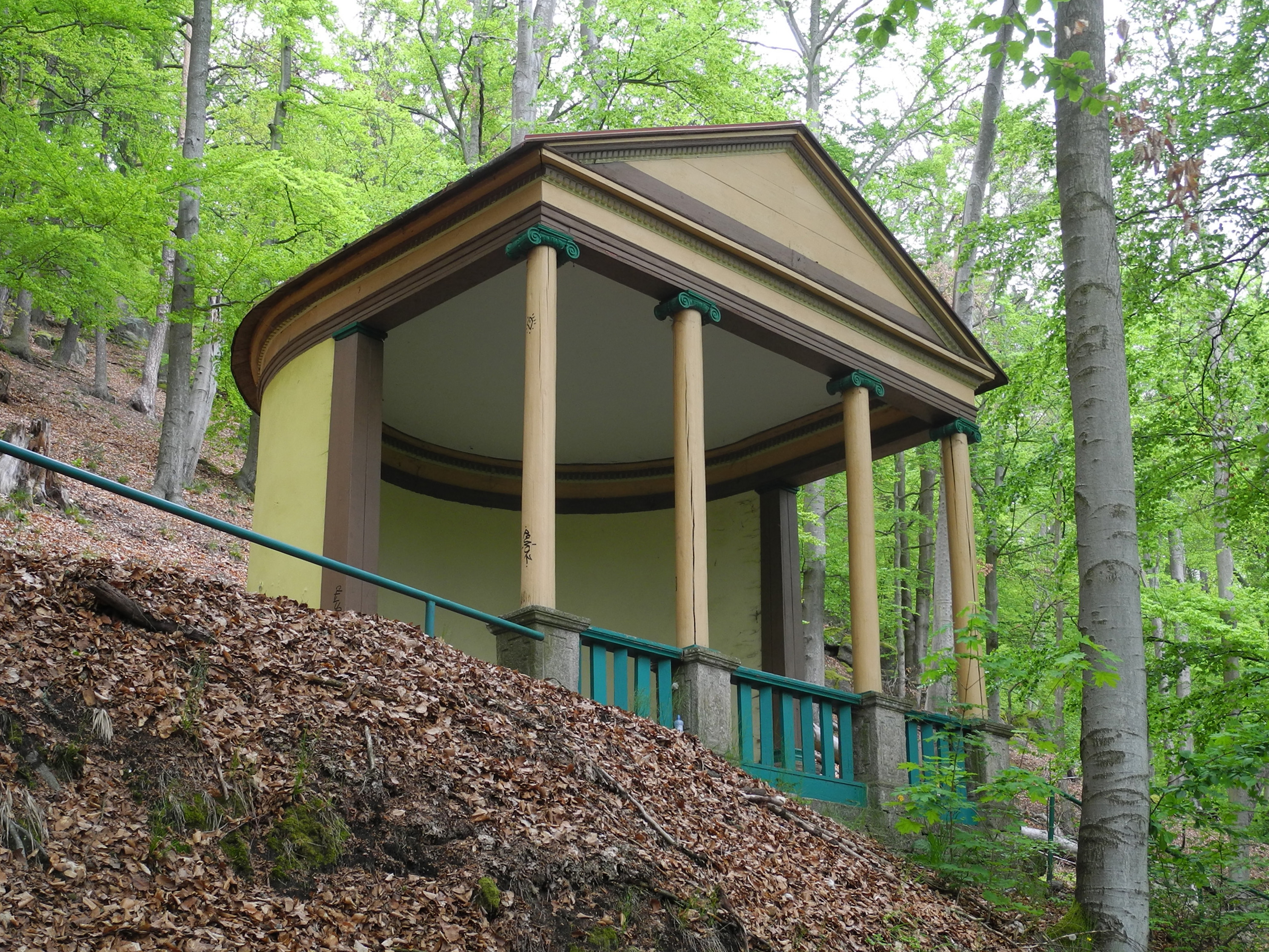 Findlater-Pavillon im Stadtwald von Karlsbad (Karlovy Vary)